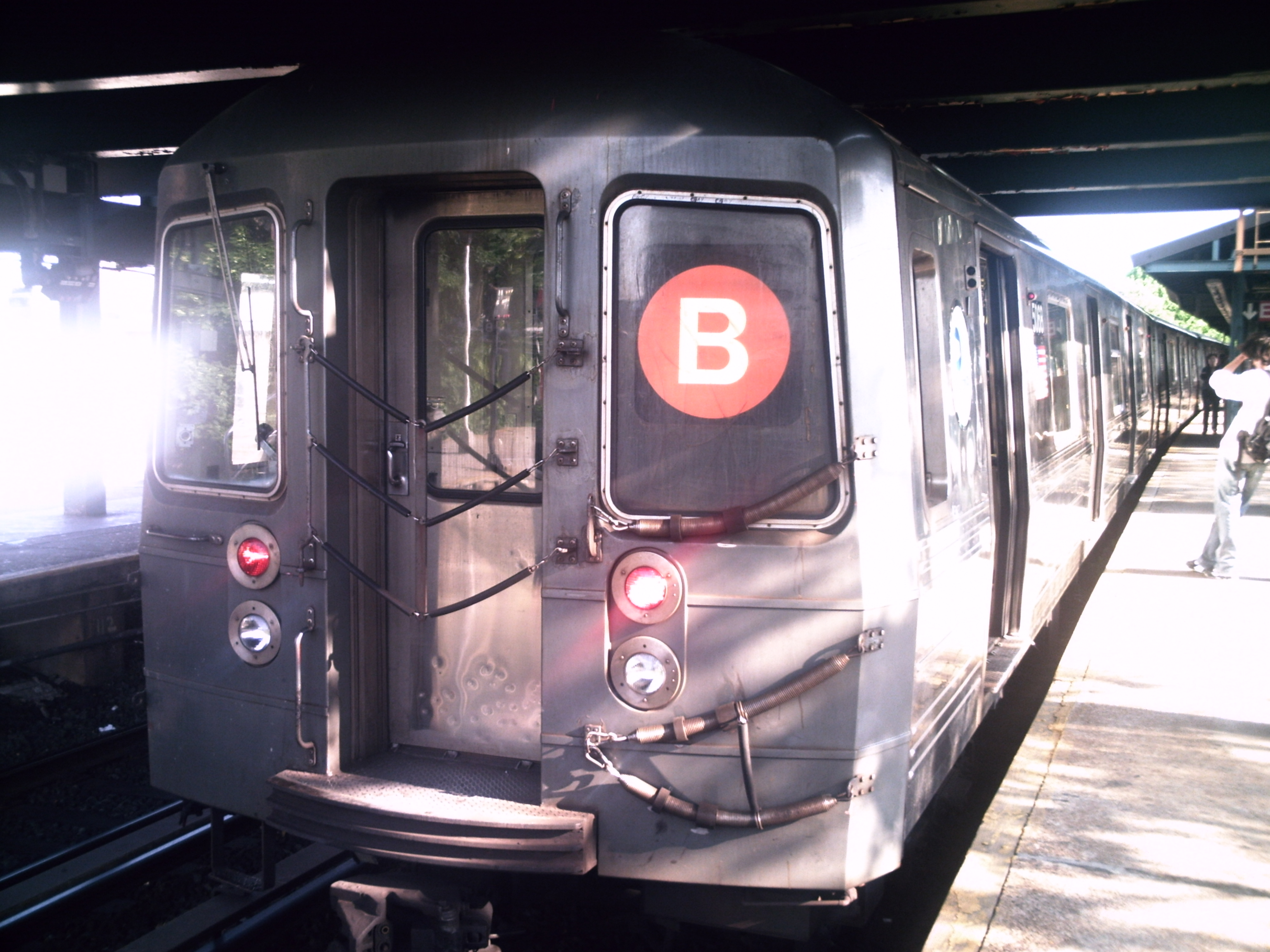 Tren del servicio B del metro de Nueva York